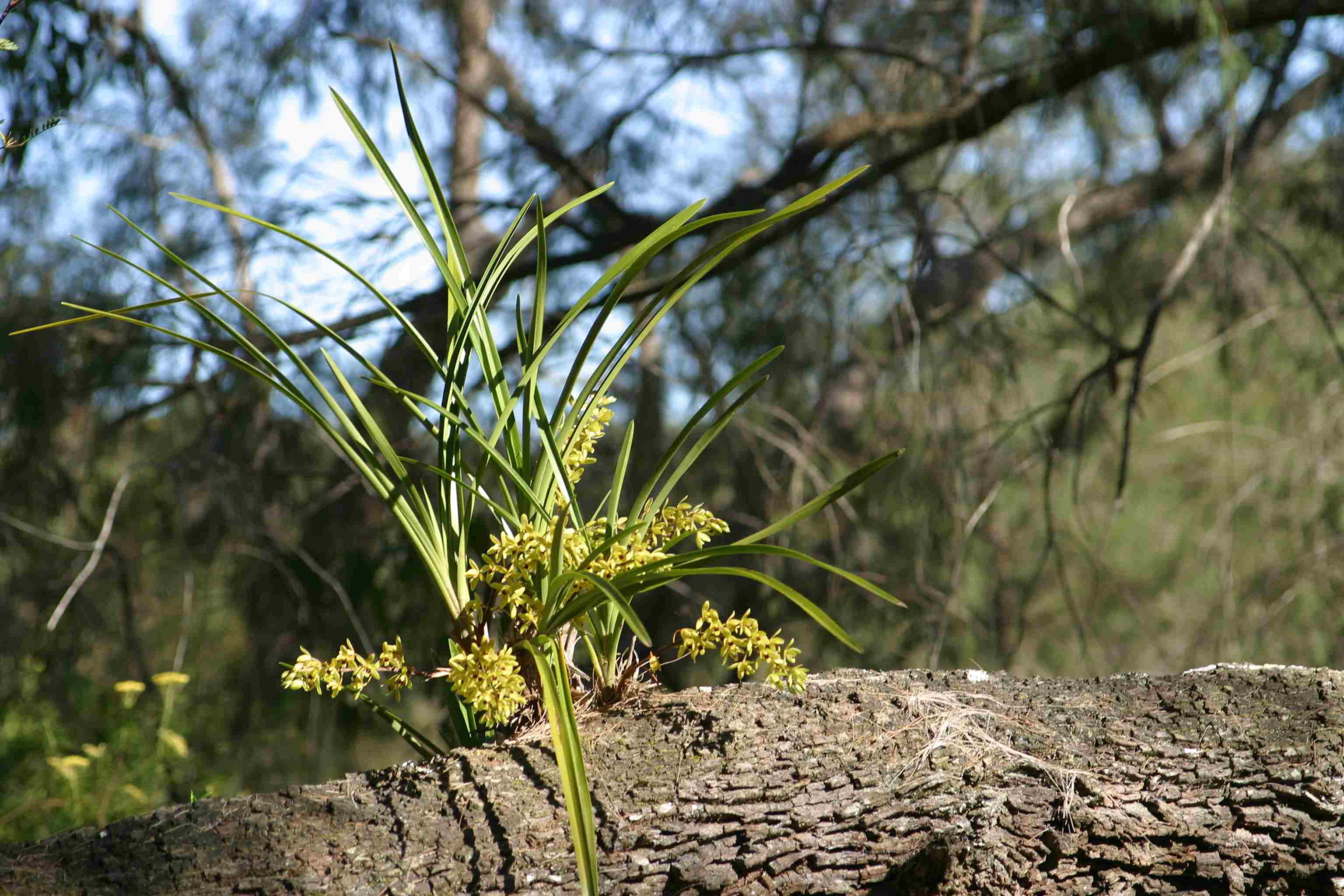 Cymbidium suave - Cymbidium suave